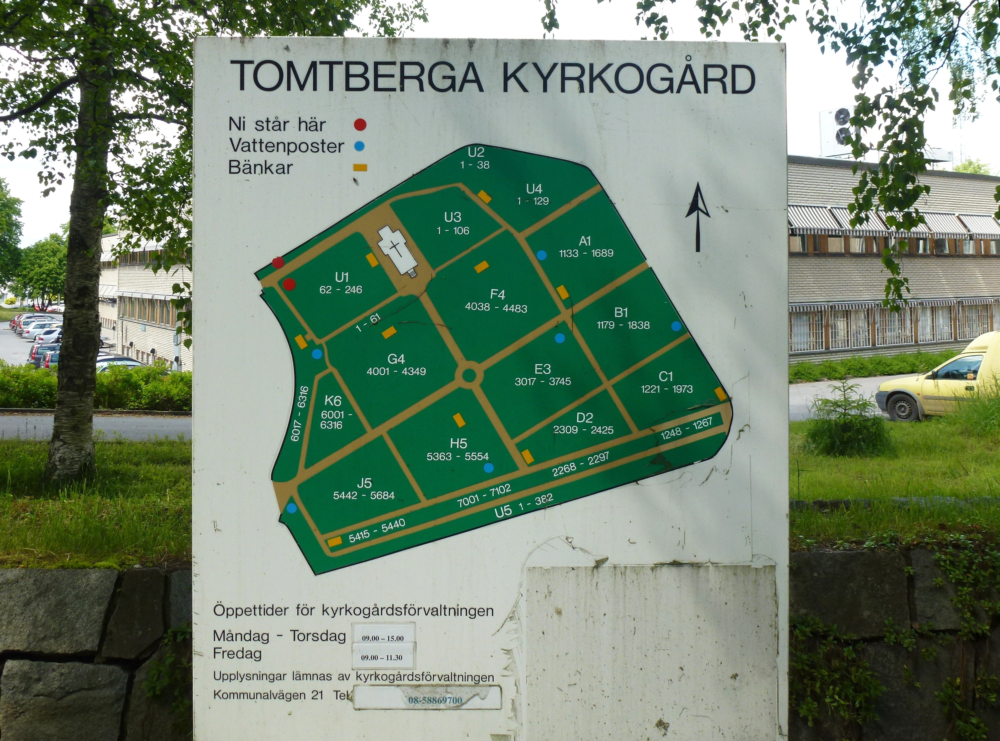 Tomtberga kyrkogård, skylt. I bakgrunden syns Huddinge kommunhus.